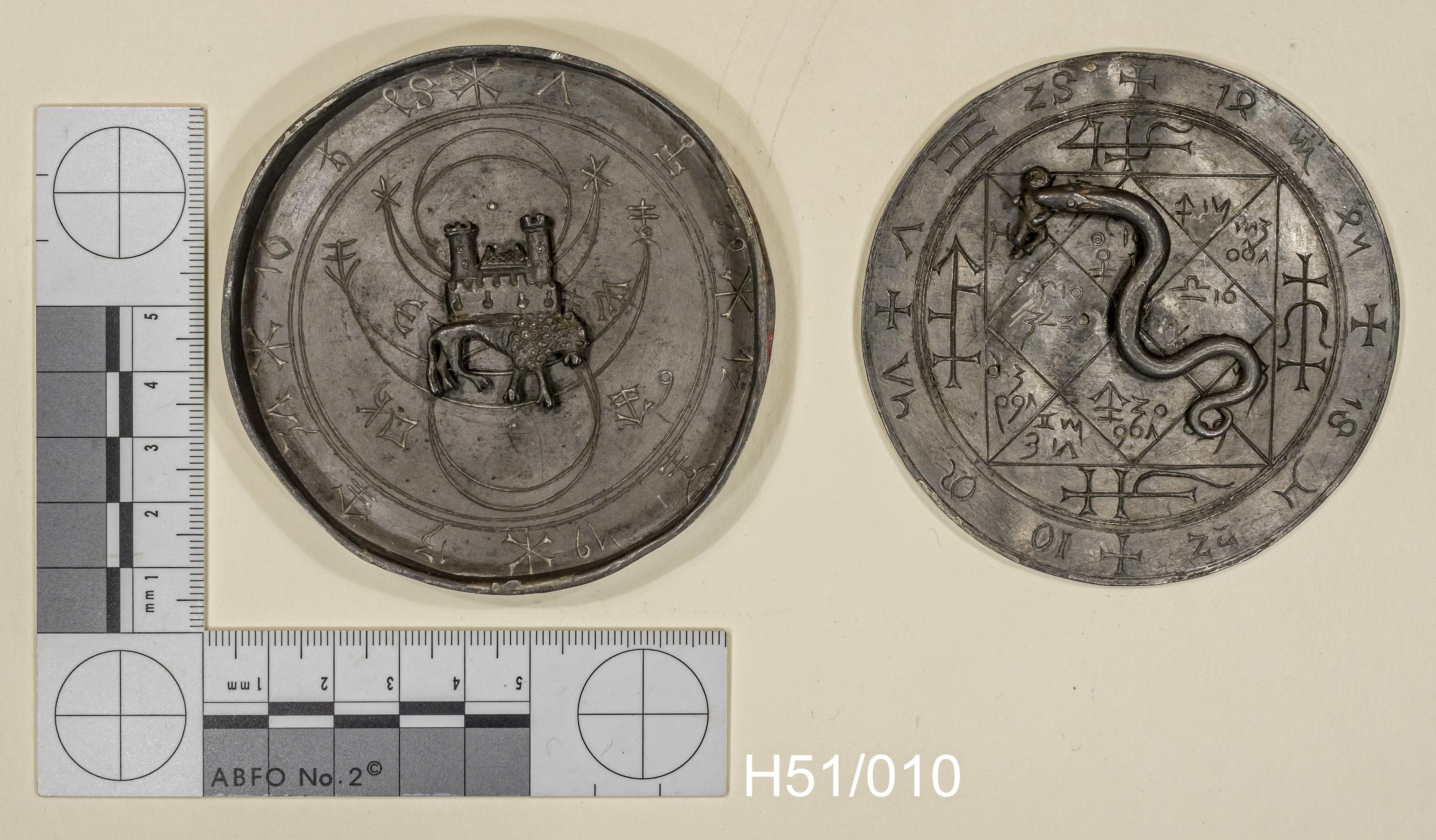 Das Bauamulett des Basler Hofs in Freiburg. Es befindet sich heute im Museum für Stadtgeschichte Freiburg mit der Inventarnummer: H 51/010. Durchmesser ca. 80mm, Höhe 11mm Es ist eine handtellergroße runde Bleidose bestehend aus Boden und Deckel, beide sind mit astrologischen Gravuren verziert und es gehören kleine plastische Figuren dazu. Es sind 3 Figuren: Ein Löwe, eine Schlange und ein Kind. Alle 3 Teile haben einen kleinen Pin auf der Rückseite, im Boden der Dose und dem Deckel ist jeweils eine entsprechende Bohrung. Es wird angenommen dass es sich um ein Horoskop handelt. Die Bleikapsel wurde 1950 unversehrt neben dem Hauptportal in den Trümmern des 1944 zerstörten Hauses gefunden. Es ist auch nicht bekannt ob das Objekt aus einem der Vorgängerbauten stammt oder für den Bau des großen Stadthauses durch Konrad Stürzel von Buchheim zwischen 1480 und 1500 hergestellt wurde. Die Schlange und der Löwe passen in beide Bohrungen, so dass zwei Konfigurationen möglich sind, die ursprüngliche Konfiguration ist nicht bekannt, es ist auch nicht bekannt ob die Figuren ursprünglich fest oder beweglich angebracht waren. Variante 1: Löwe auf dem Dosenboden und Schlange mit Kind auf dem Deckel = ursprüngliche Anordnung. Variante 2: Schlange mit Kind auf dem Dosenboden und Löwe auf dem Deckel. Hier Variante 1. In der ursprünglichen Anordnung, war der Kopf der Schlange anders als hier abgebildet unten. Die Bilder kamen zustande mit der freundlichen Unterstützung des Museum für Stadtgeschichte.